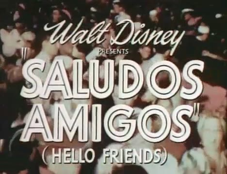 Imatges del tràiler de la pel·lícula "Saludos Amigos". Els tràilers de les pel·lícules publicats abans de 1964 als Estats Units es troben en domini públic